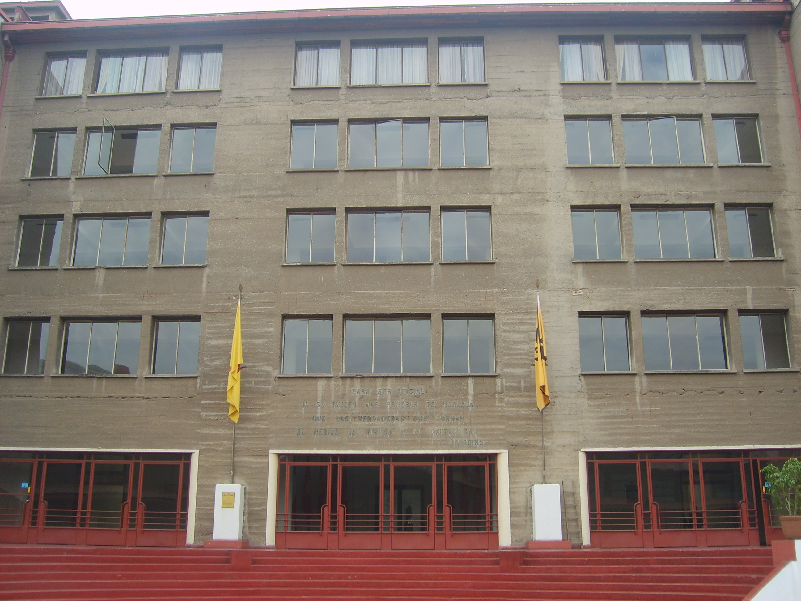 Fotografía del interior de la Escuela Militar